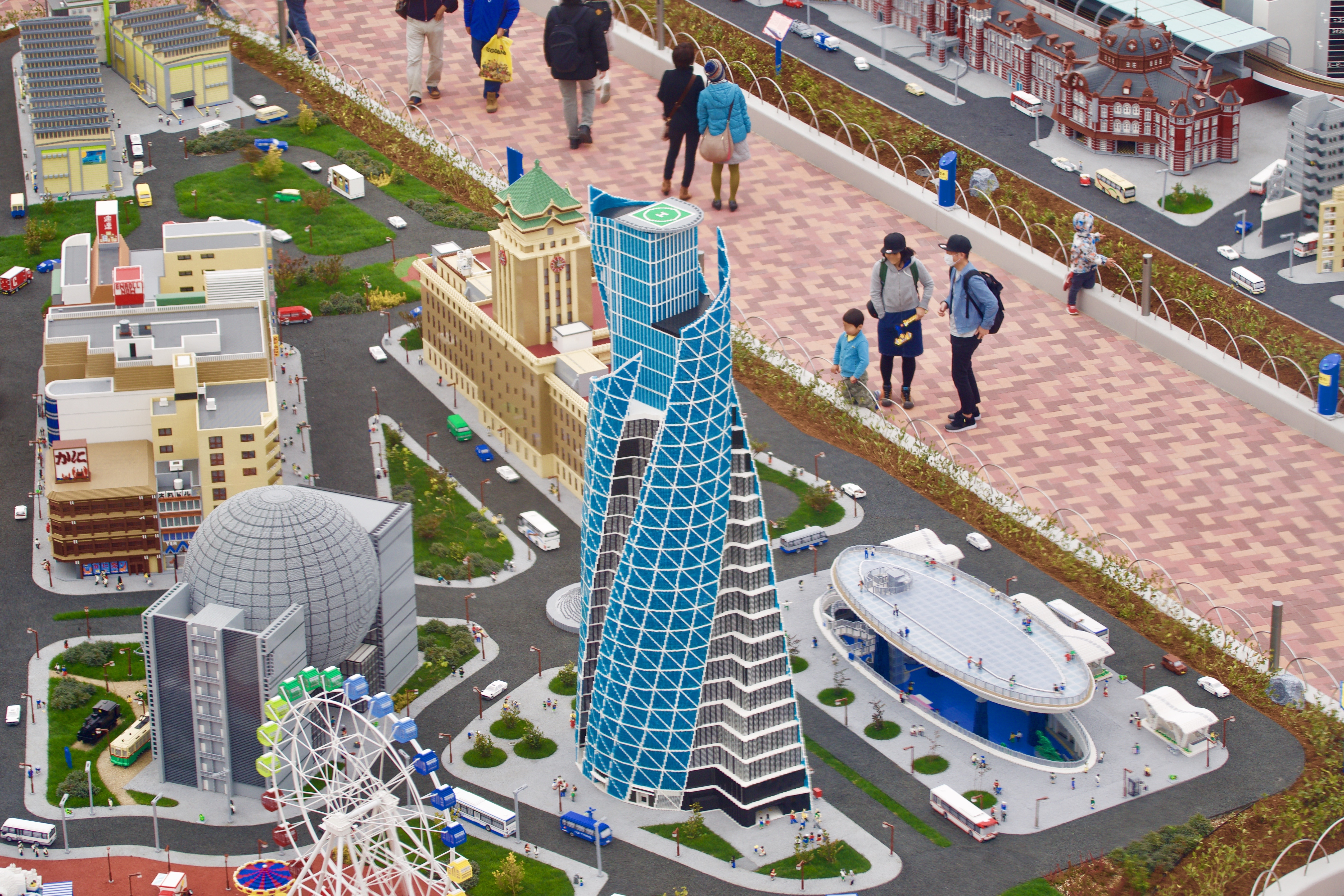 レゴランド・ジャパン スパイラルタワー